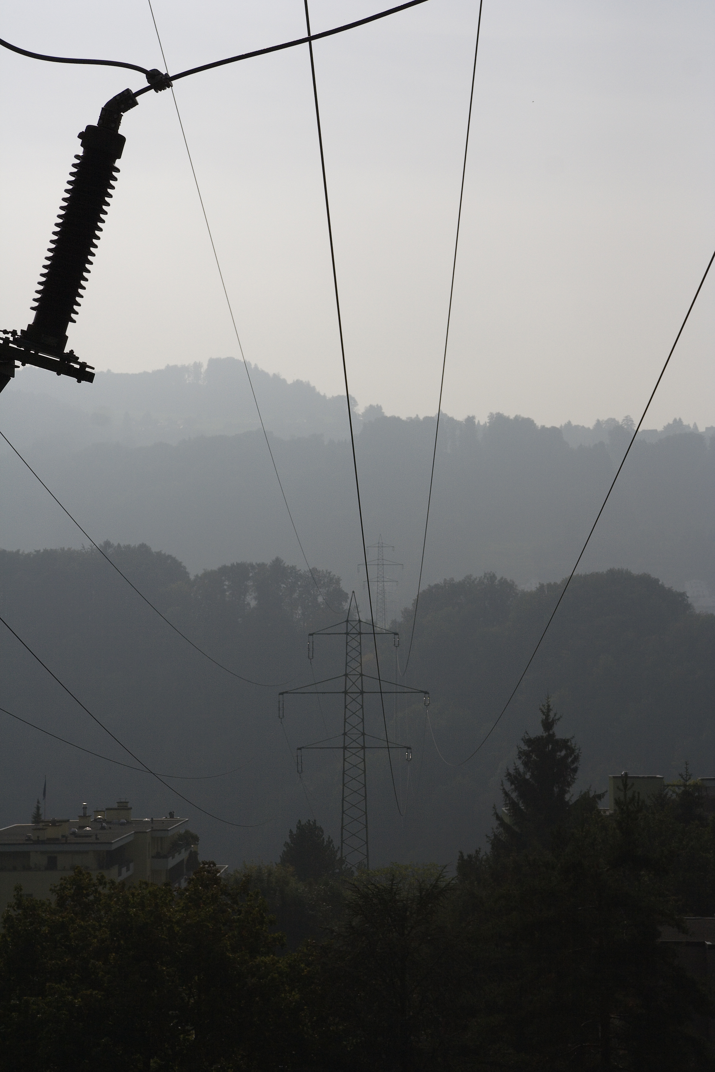 Weitspann-Hochspannungsfreileitung in Gattikon, Gemeinde Thalwil, Schweiz, Blickrichtung Obfelden Die Leitung führt vom EKZ-NOK Unterwerk Thalwil nach Obfelden, sie gehört den NOK